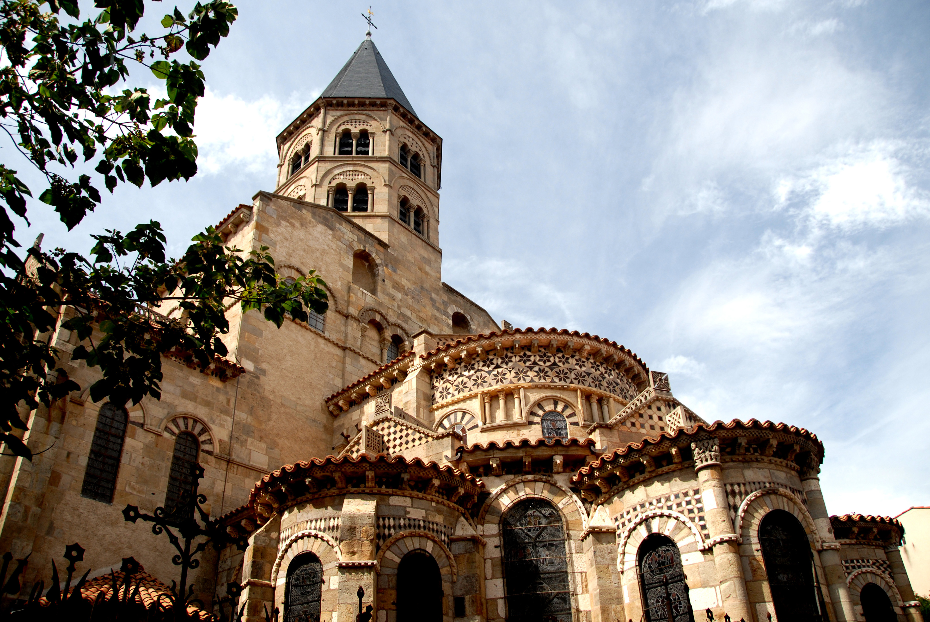 Notre-Dame du Port, Chothaupt von SO